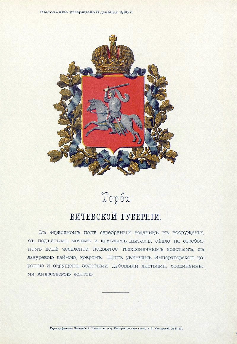 Official Russian Empire coat of arms Vitebsk Governorate. Герб Российской Империи Витебской губернии с официальным описанием в Гербовнике Бенке. Утверждён Императором Всероссийским Александром Вторым.